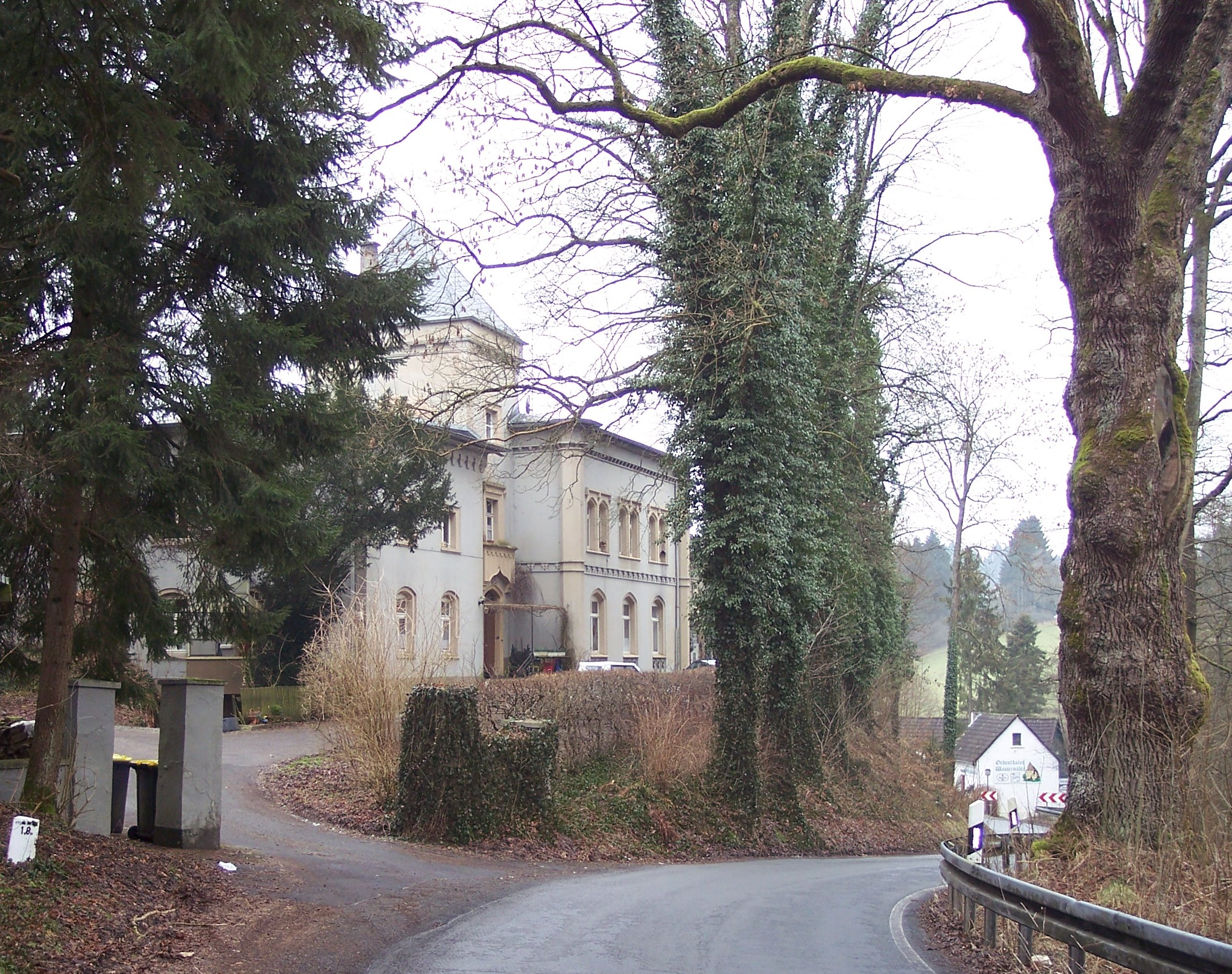 Lüdenscheid, Schloss Oedenthal,Haupt- oder Straßenfront